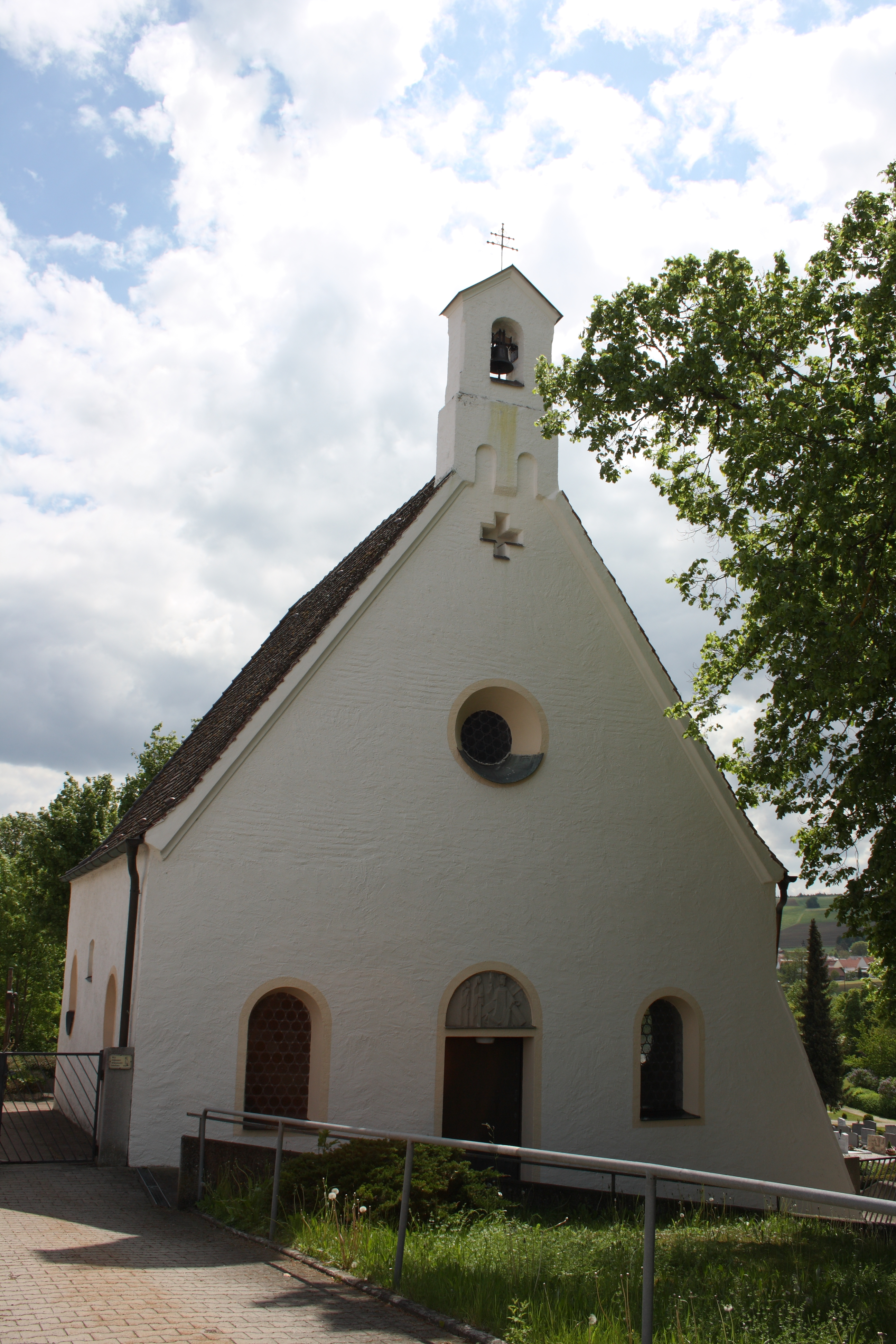 katholische Friedhofskapelle in Bissingen im Landkreis Dillingen an der Donau (Bayern), 1. Hälfte 17. Jahrhundert